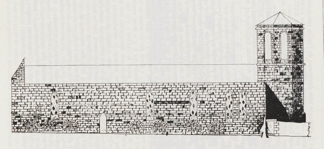 Saint-Clar, Gers, Occitanie, France : ancienne église Sainte-Catherine, plans relevés au milueu du XIXe siècle par l’entrepreneur Bourrousse : élévation sud.